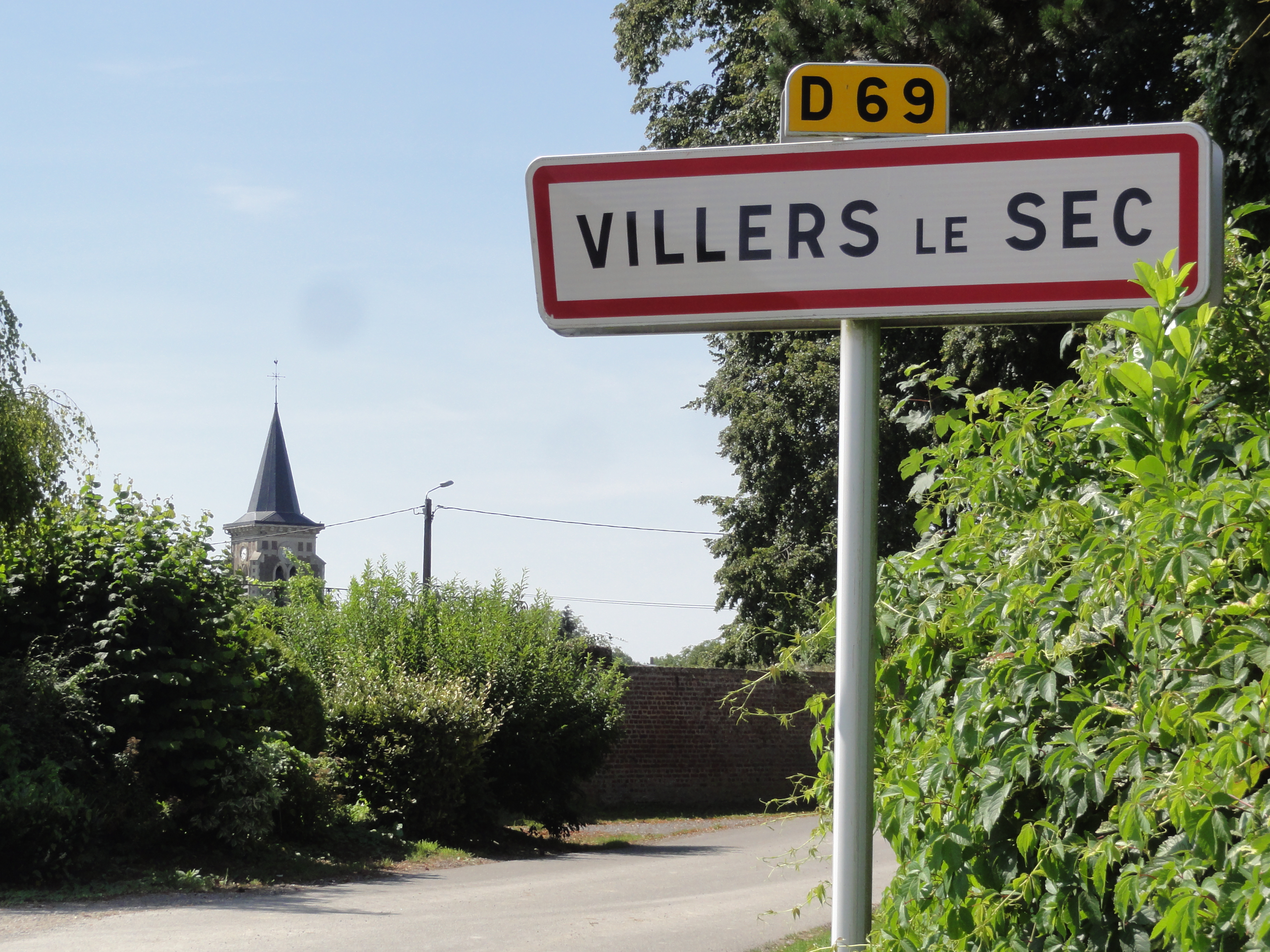 Villers-le-Sec (Aisne) city limit sign